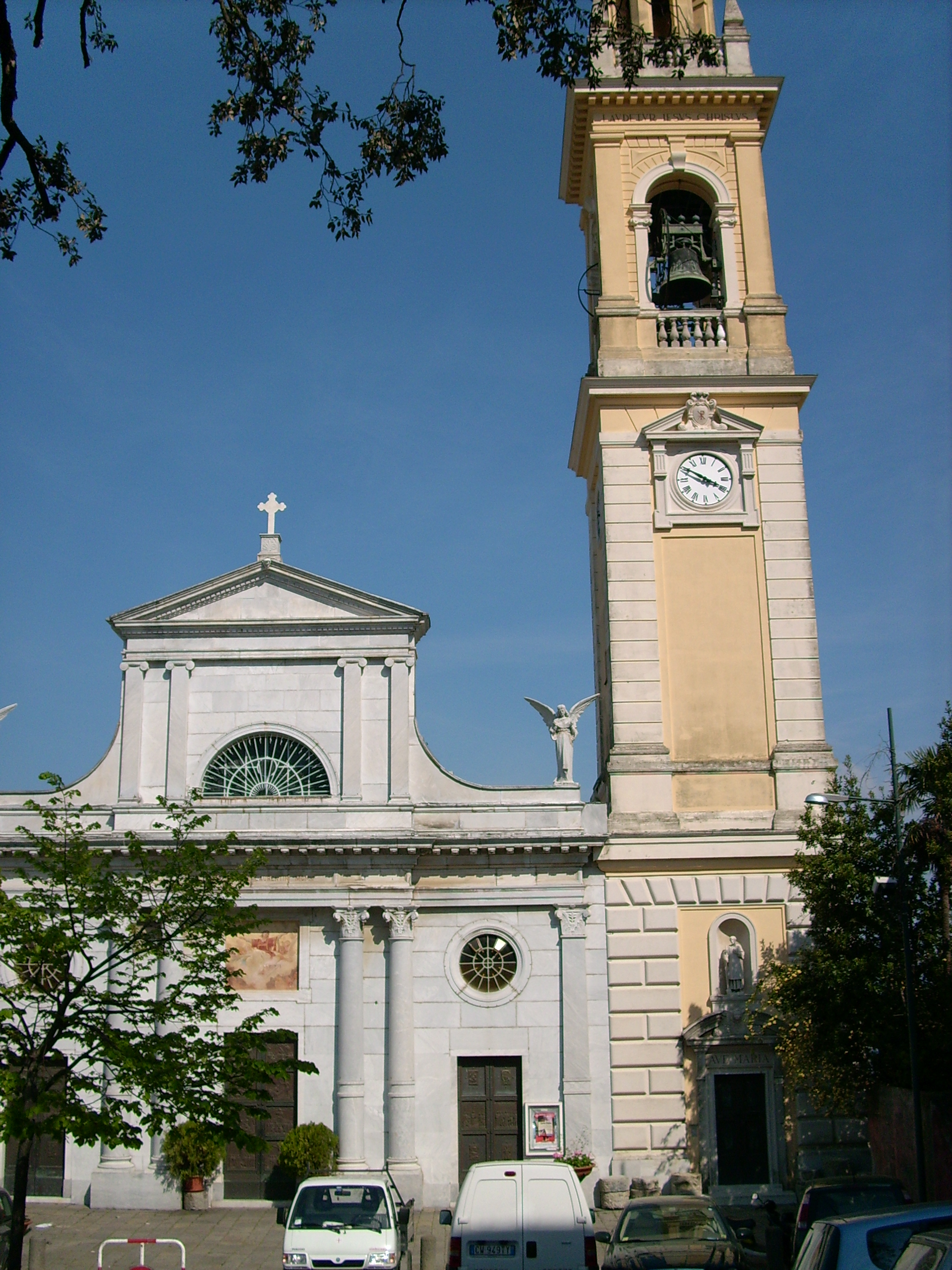 Chiesa di San Lorenzo a San Lorenzo della Costa (Santa Margherita Ligure), Liguria, Italia